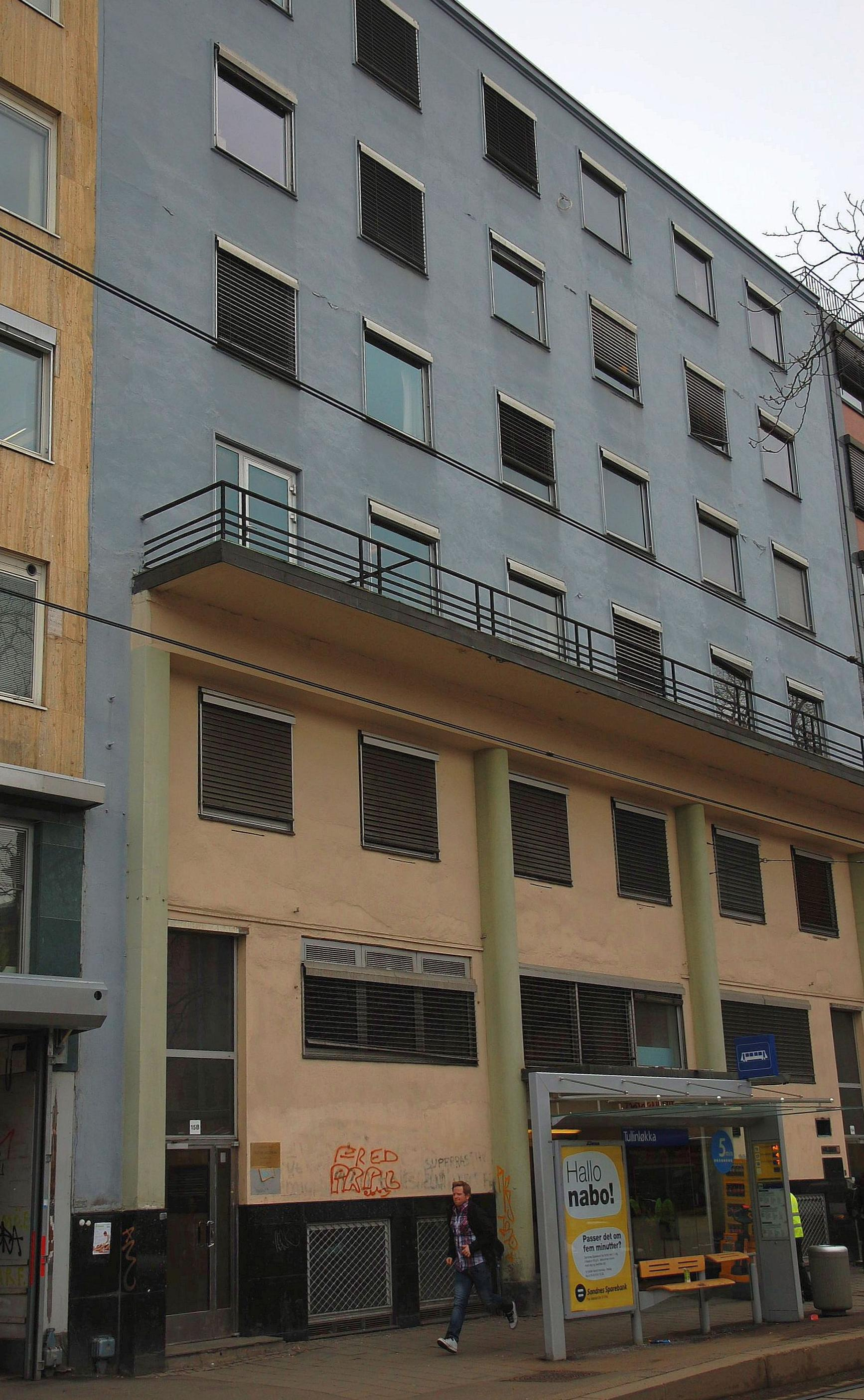 Kristian Augusts gate 15 i Oslo. Bårdar Akademiet AS.